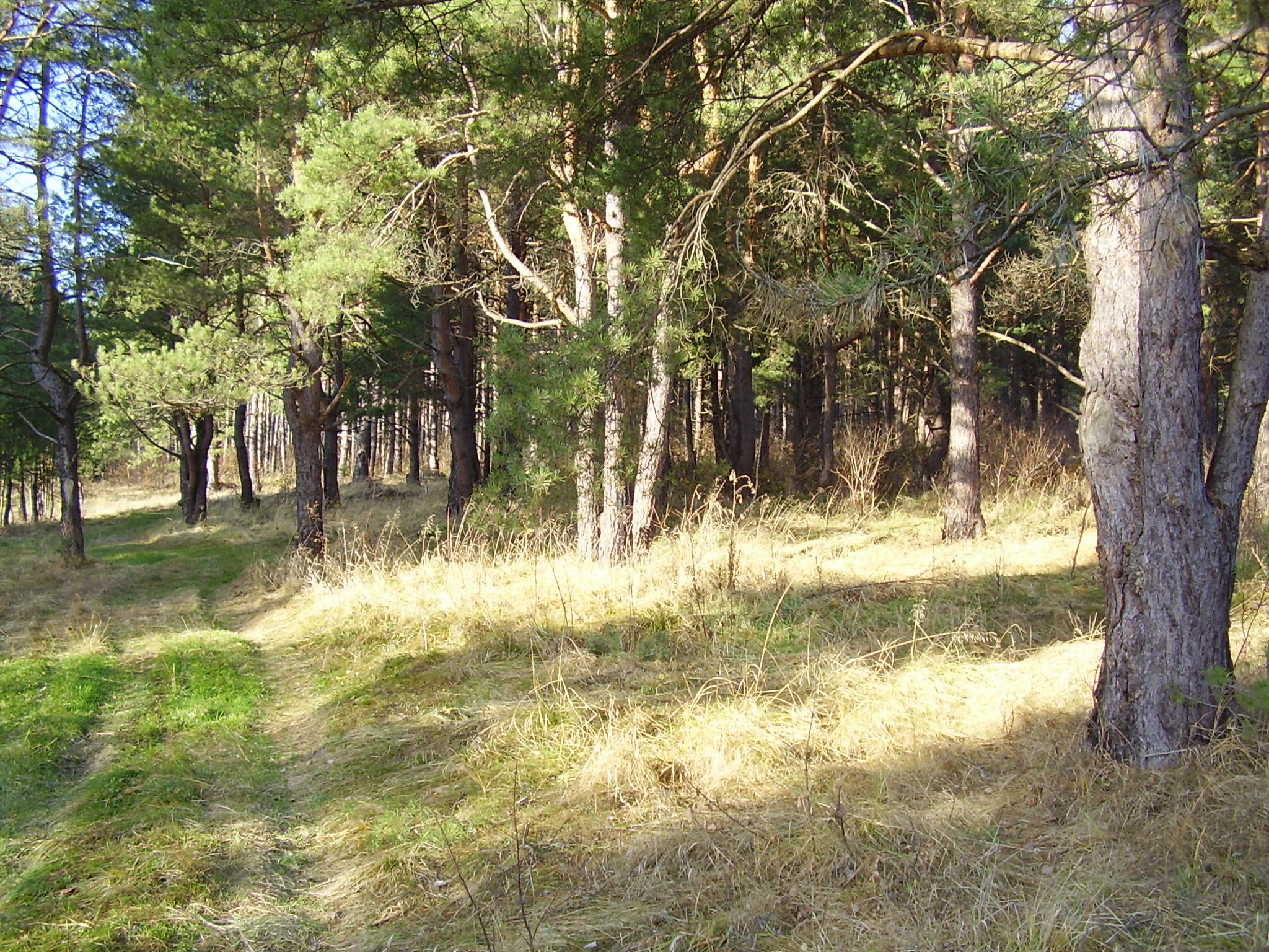 ZDJęCIE LASU W OKOLICACH BIRCZY